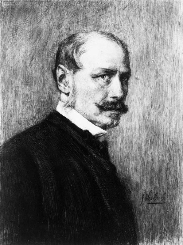 August von Pettenkofen (1822–1899)